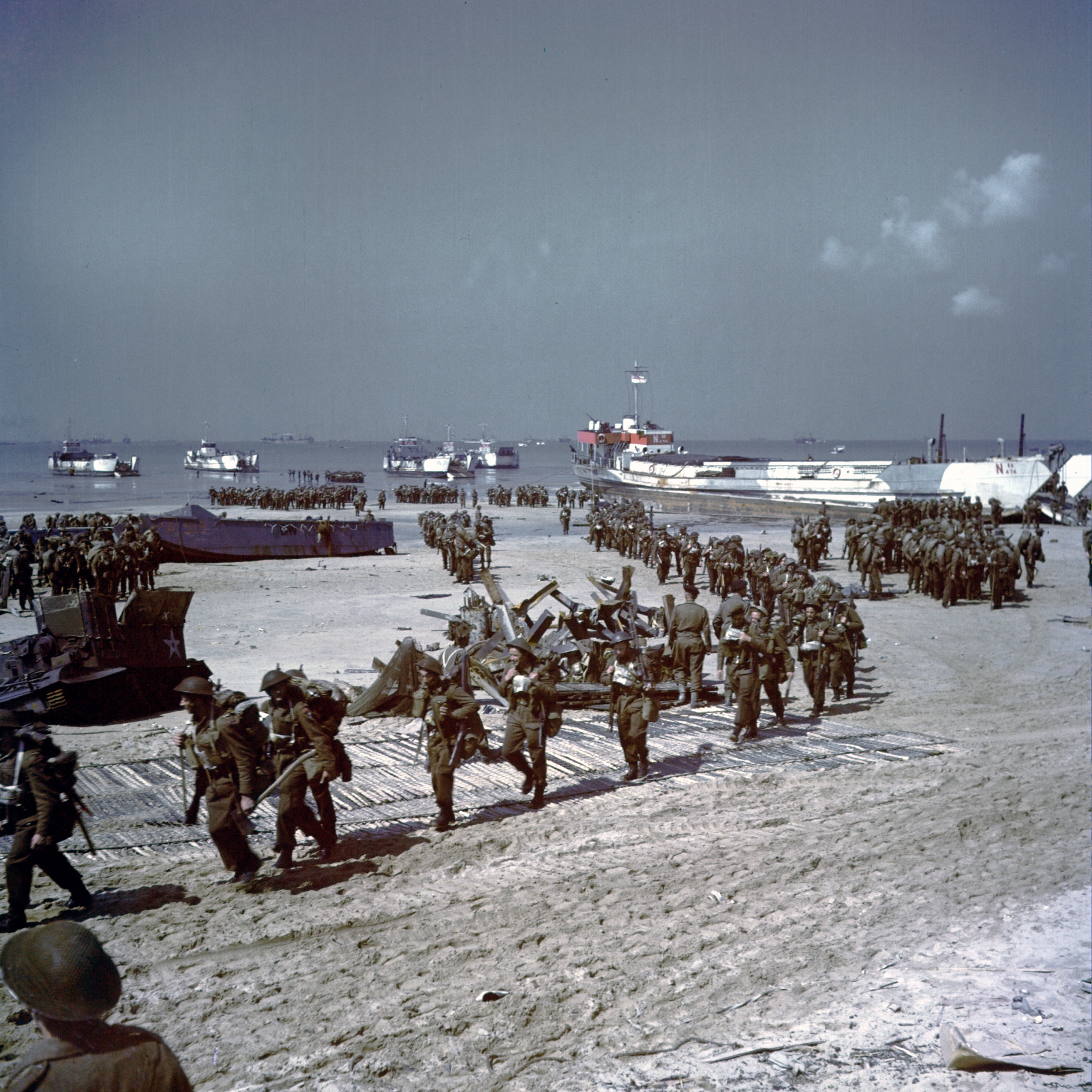 Vue générale de la plage de Juno Beach . Une multitude de soldats de l'infanterie canadienne est en train de débarquer sur les plages de Juno Beach.